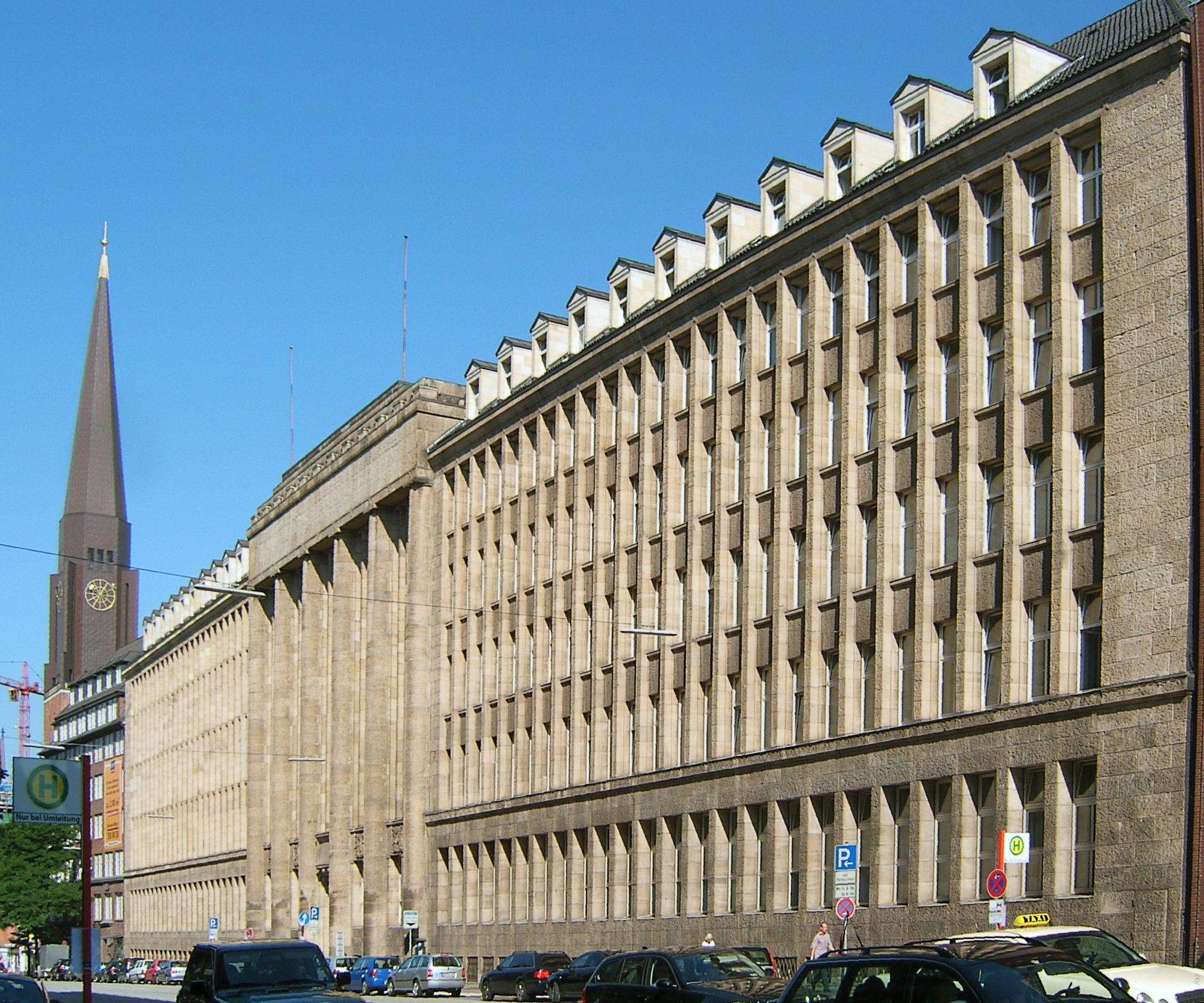 Ehemalige Karstadt-Hauptverwaltung in der Steinstraße in Hamburg-Altstadt. Erbaut 1921 bis 1924 nach Entwürfen von Philipp Schäfer.This is a photograph of an architectural monument.